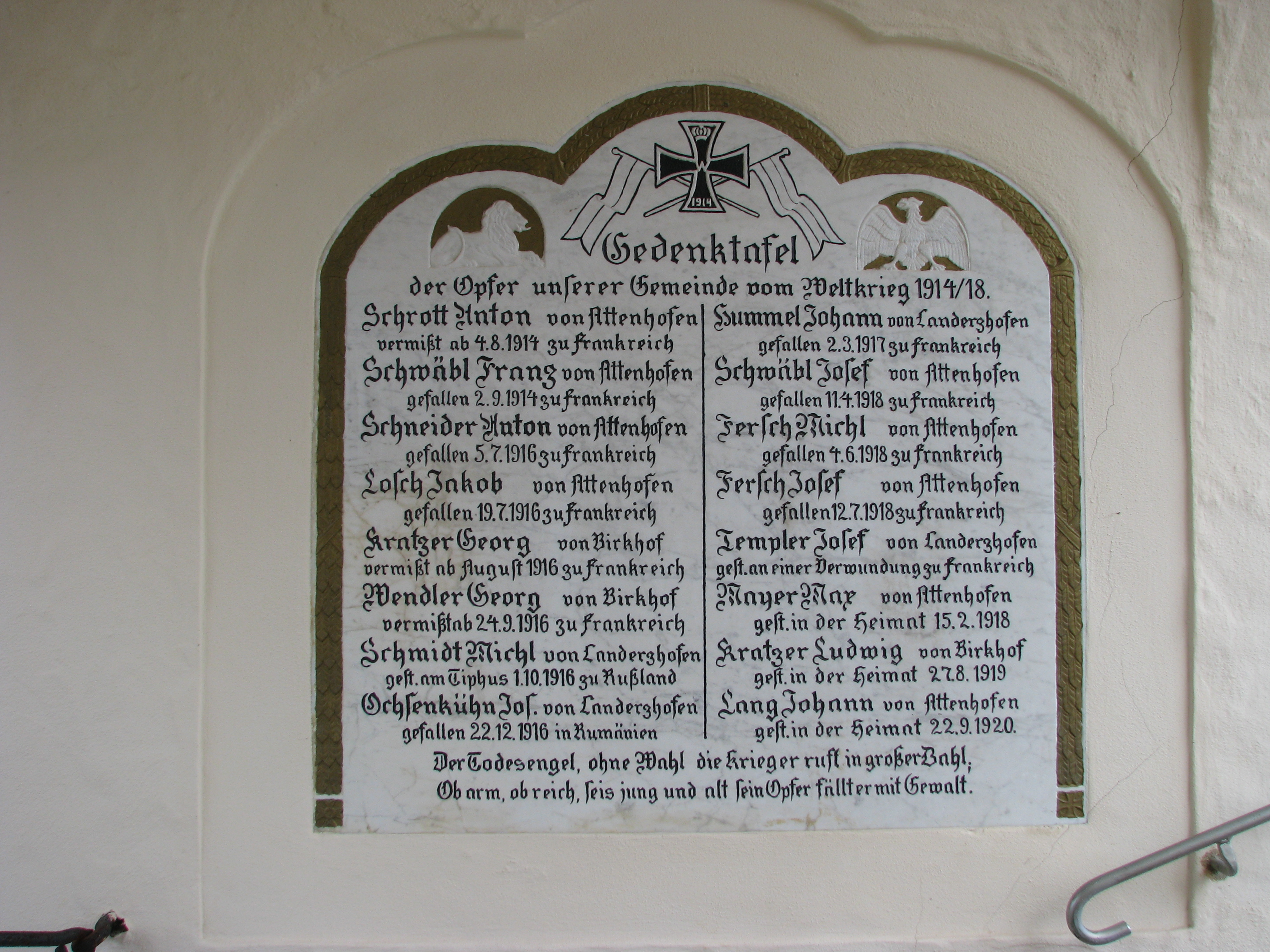 Landerzhofen, Ortsteil von Greding im Landkreis Roth, Kriegerdenkmal im Turm der Friedhofsbefestigung